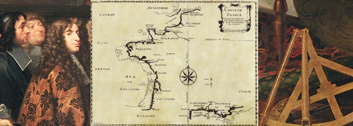 Photo-montage d'après : 1- détails image Testelin : Accès en ligne 2- carte La Hire : Accès en ligne